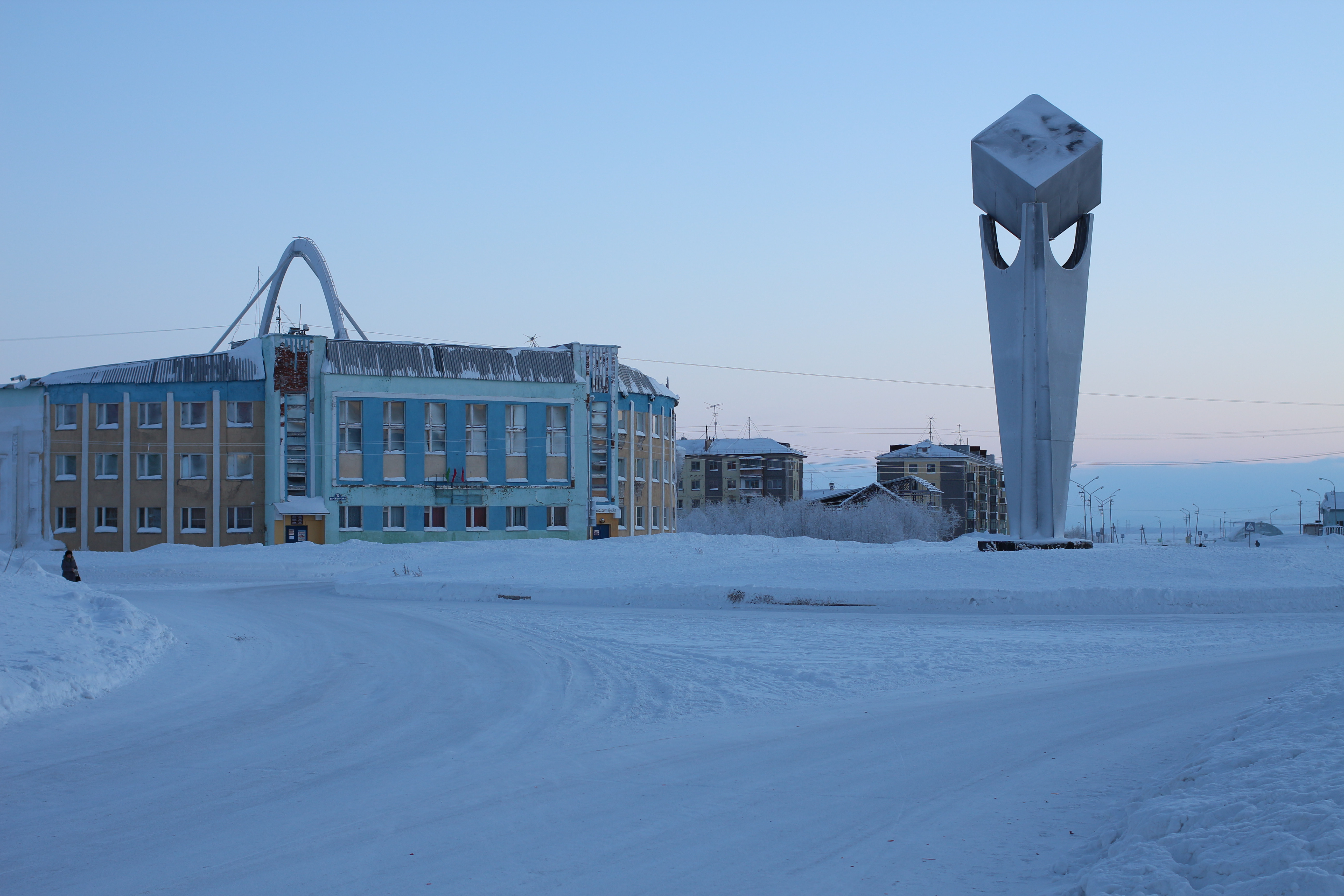 Спорткомплекс "Воргашорец" и стела "Уголь" (5 января 2015 год)